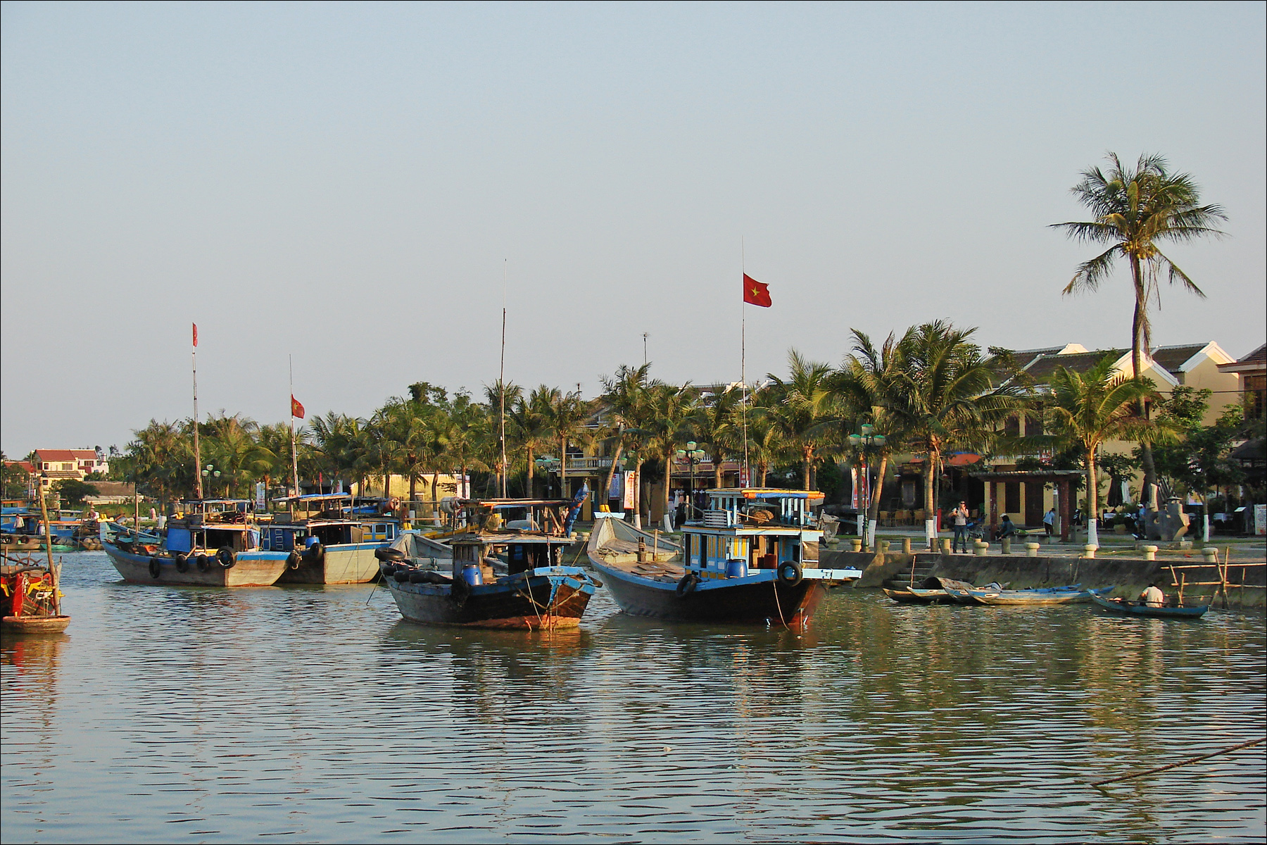 Située à l'embouchure du fleuve Thu Bon, Hoi An a été, à partir du XVème siècle et jusqu'au XIXème, un port international important pour l'Asie du Sud-Est. Hoi An était une cité très active qui servait de port d’approvisionnement. A l'époque, La plupart des échanges commerciaux avec des pays étrangers avaient lieu à Hoi An. Les bateaux de commerce venaient de la Chine, du Japon, de la Thaïlande, du Cambodge, des Philippines et de l'Indonésie et des pays européens comme la Hollande, le Portugal, l’Espagne, l’Angleterre et de la France. Lors de leurs trajets en Extrême-Orient pour des affaires commerciales, tous faisaient escale à Hoi An. L'animation causée par les relations commerciales a transformé la petite ville en un centre d'échanges culturels, un port commercial qui a connu la prospérité et a permis le développement de l'élevage des vers à soie et du tissage. Puis l'estuaire du fleuve Thu Bon s'est ensablé et le commerce a dû se déplacer vers la baie de Danang, mieux située. La vieille ville de Hội An est inscrite au patrimoine mondial de l'UNESCO. C'est un des atouts touristiques du Centre du Vietnam.